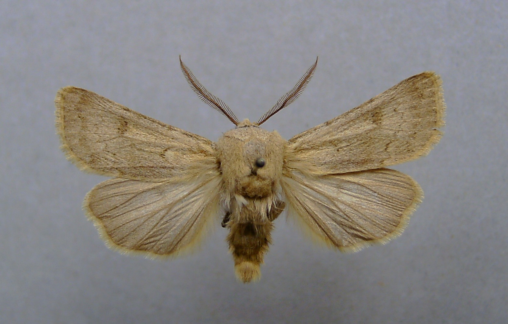 Agrotis turatii, Albarracín, Spanien